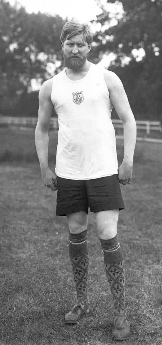 26-5-12, Colombes, Tison [vainqueur des lancers du disque et du poids] : [photographie de presse] / [Agence Rol]